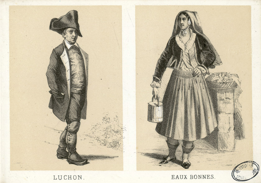 Album dépliant de 12 planches, portant 24 costumes, version abrégée de "50 costumes des Pyrénées" de Ch. Maurice qui a paru vers 1850. Ancely, René (1876 - 1966). Possesseur